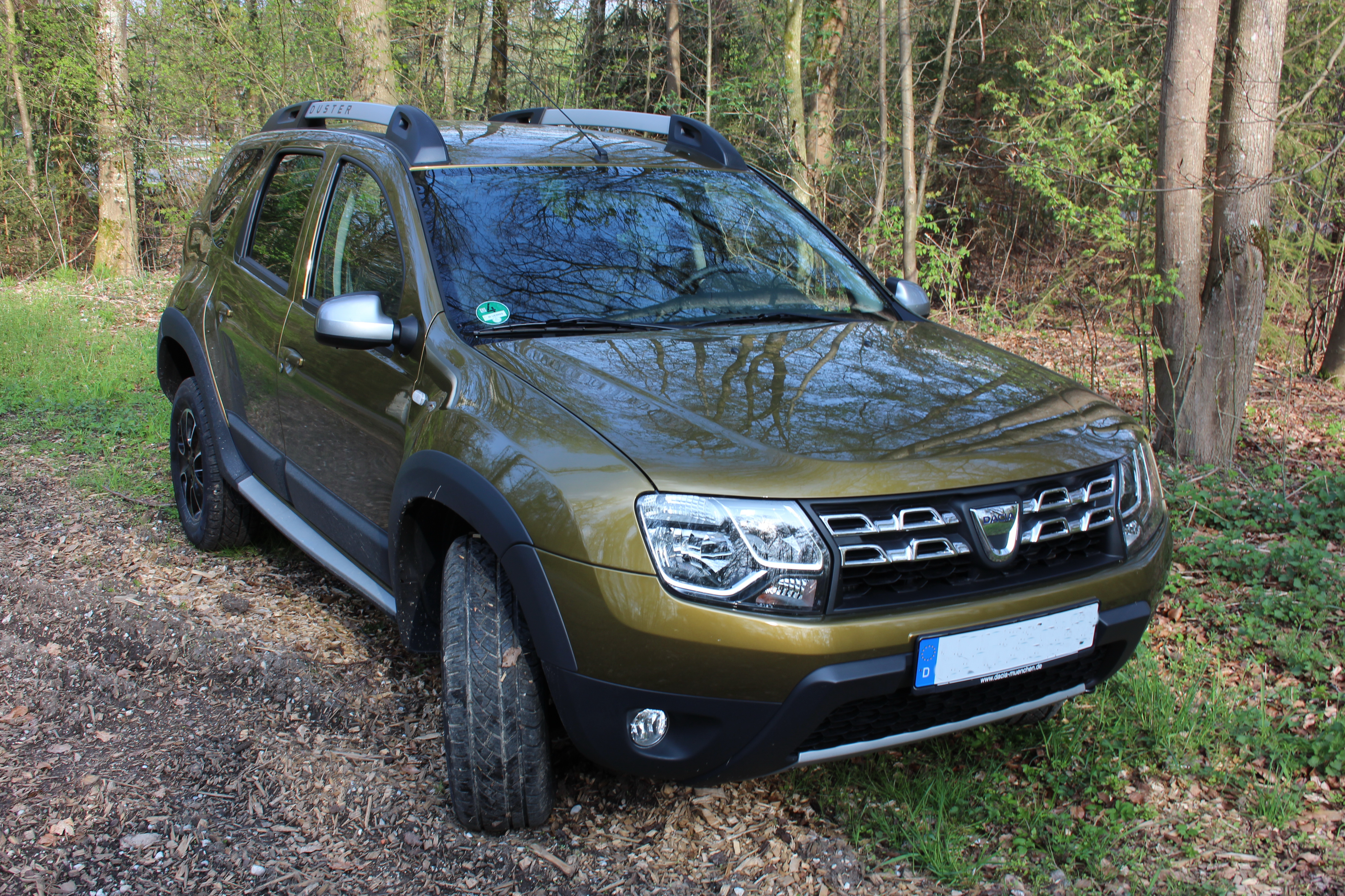 Dacia Duster, Sondermodell Urban Explorer, Altai Grün